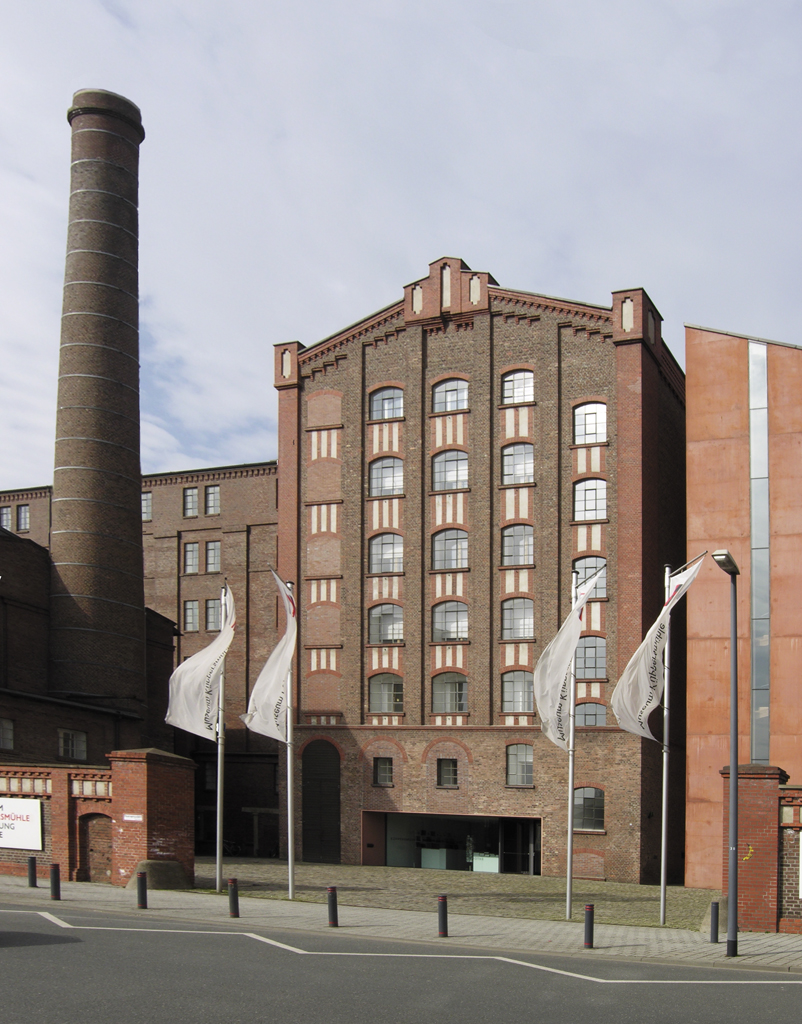 Duisburg, Museum Küppersmühle Sammlung Grothe Url